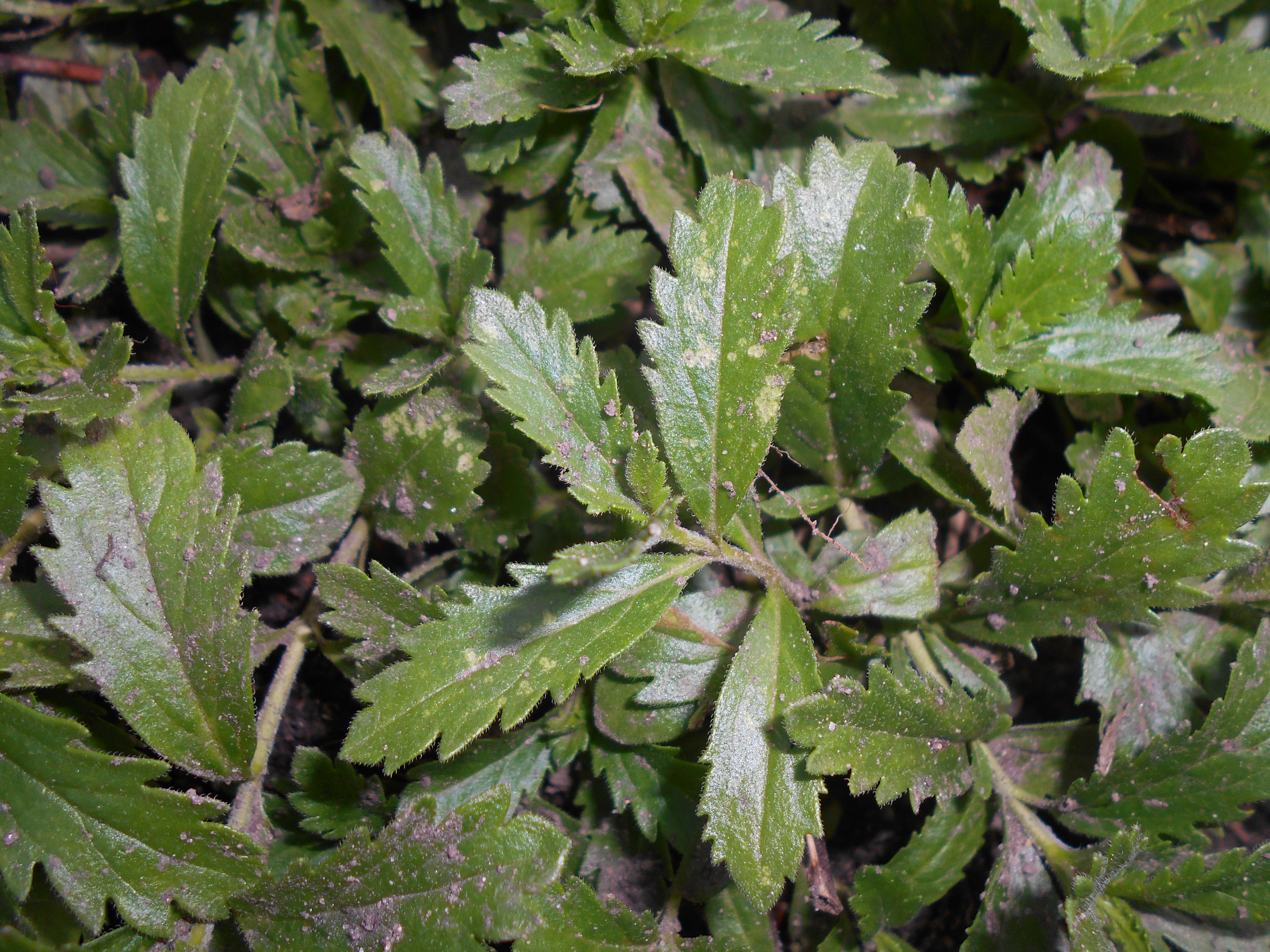 Veronica austriaca subsp. austriaca, Ogród Botaniczny Uniwersytetu Wrocławskiego.